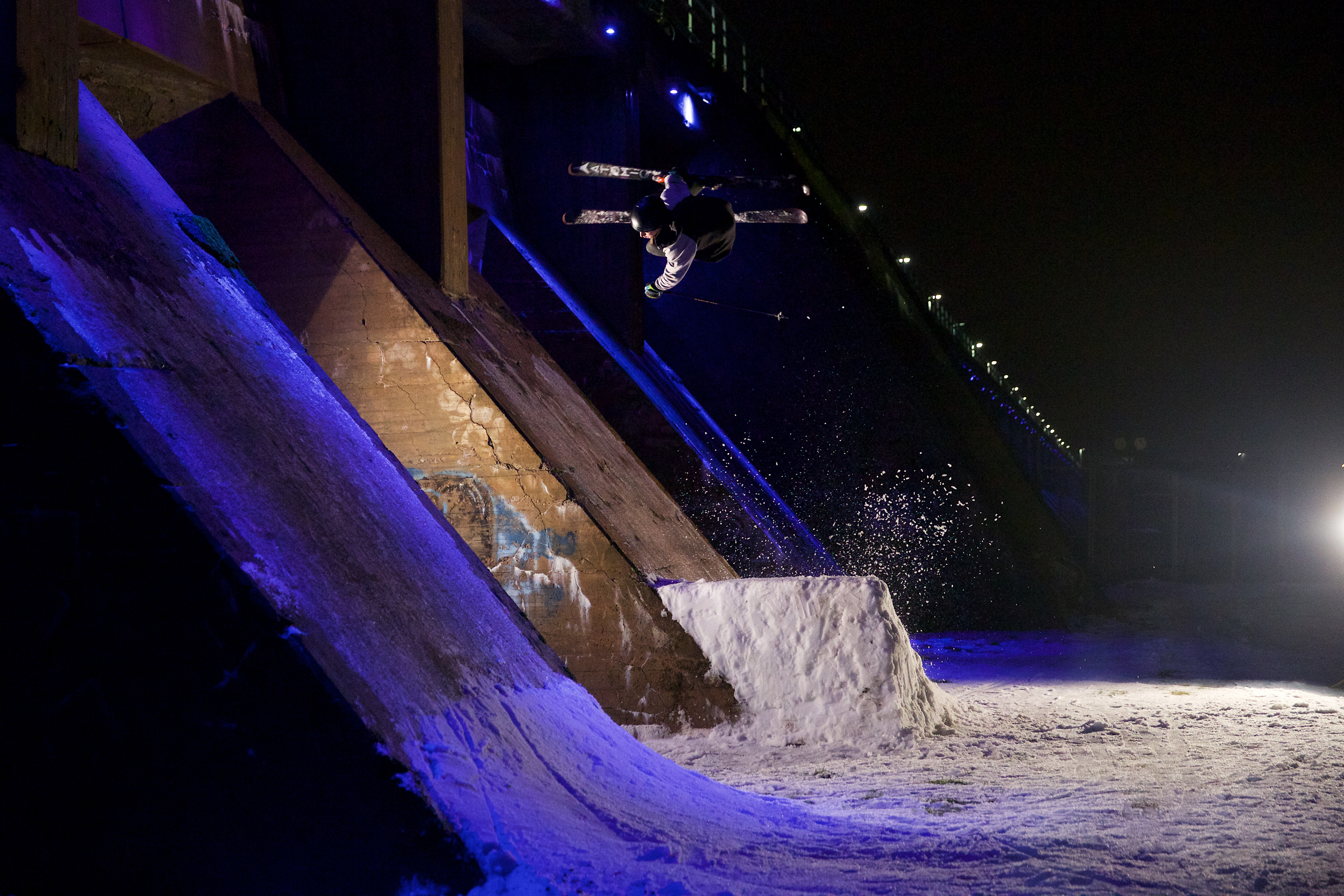 Juho Kilkin flatspin Real Skifi Episode 14. Kuva Janne Korpela